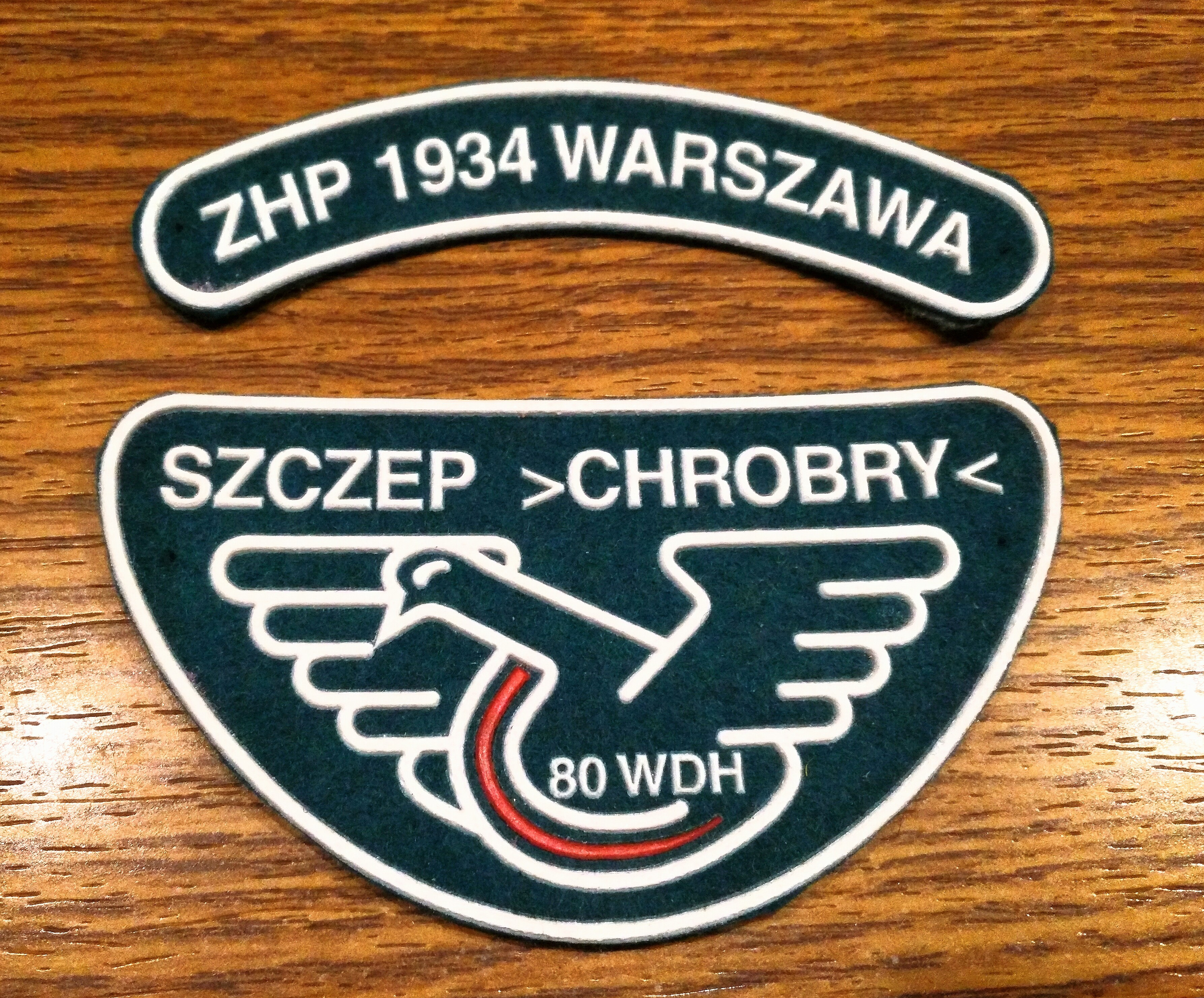 Plakietki szczepu 80 WDHiZ im. Bolesława Chrobrego